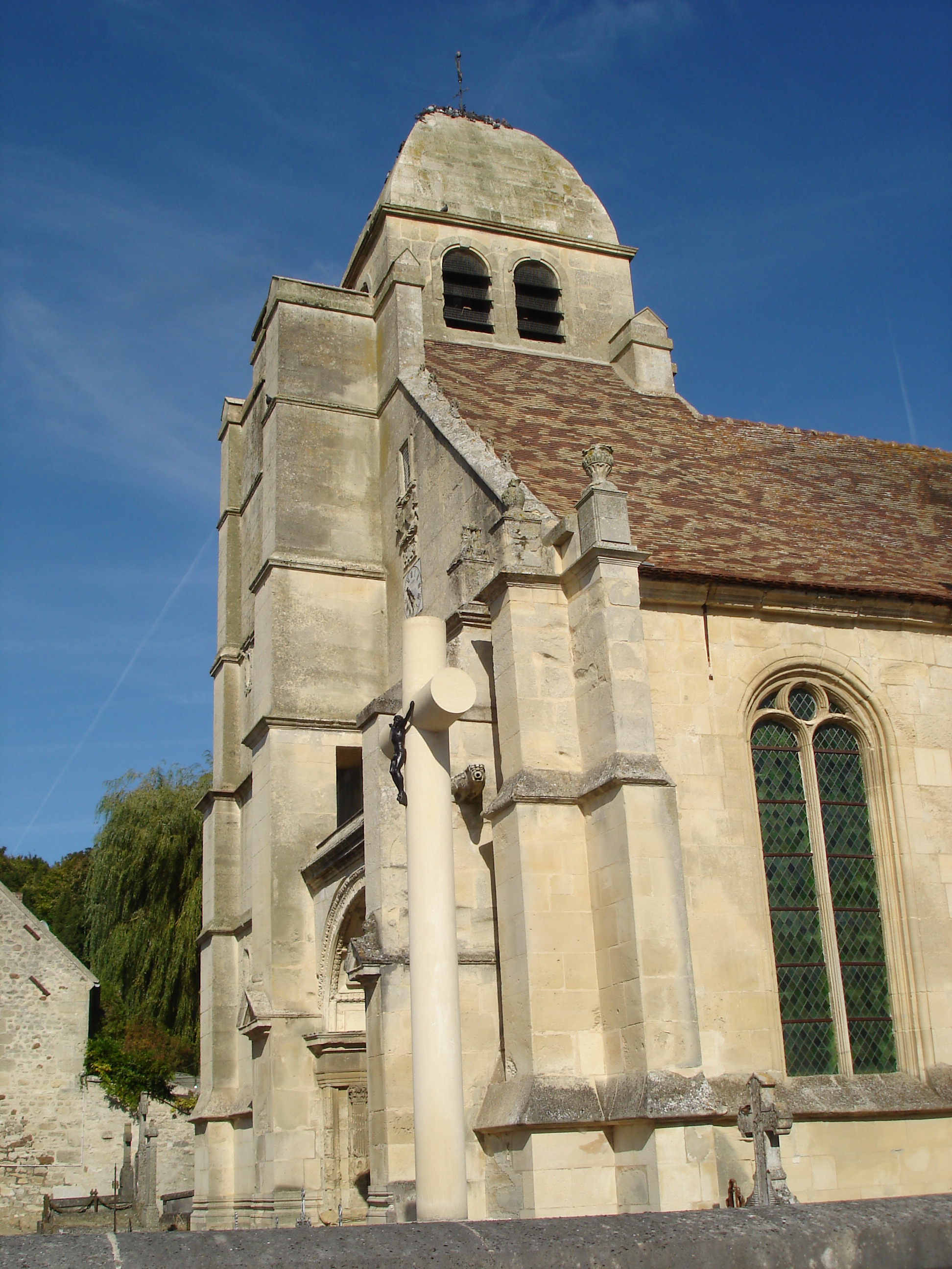 Eglise saint Nicolas de Guiry-en-Vexin (Val d'Oise) France.